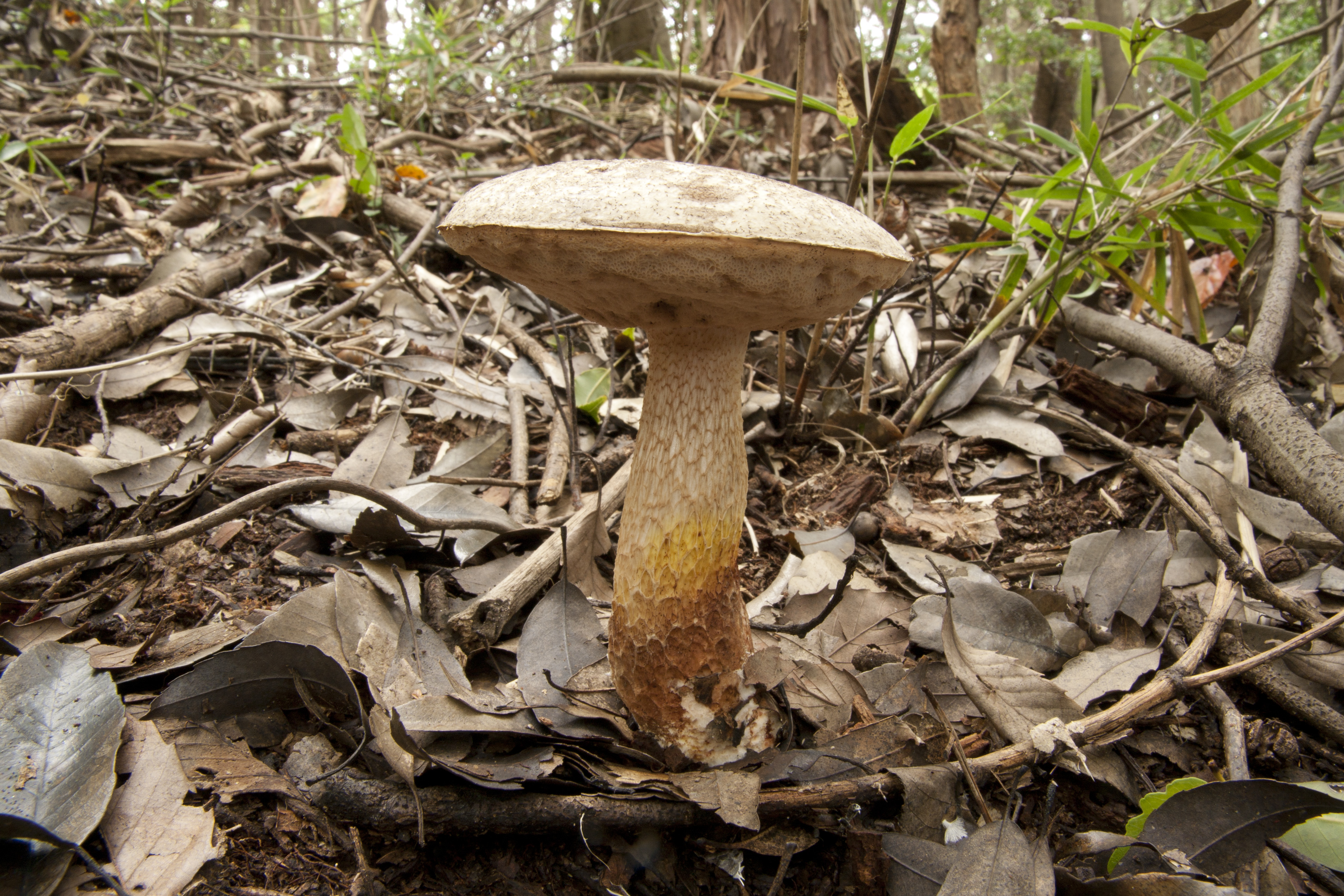 ホオベニシロアシイグチ (学名:Tylopilus valens)